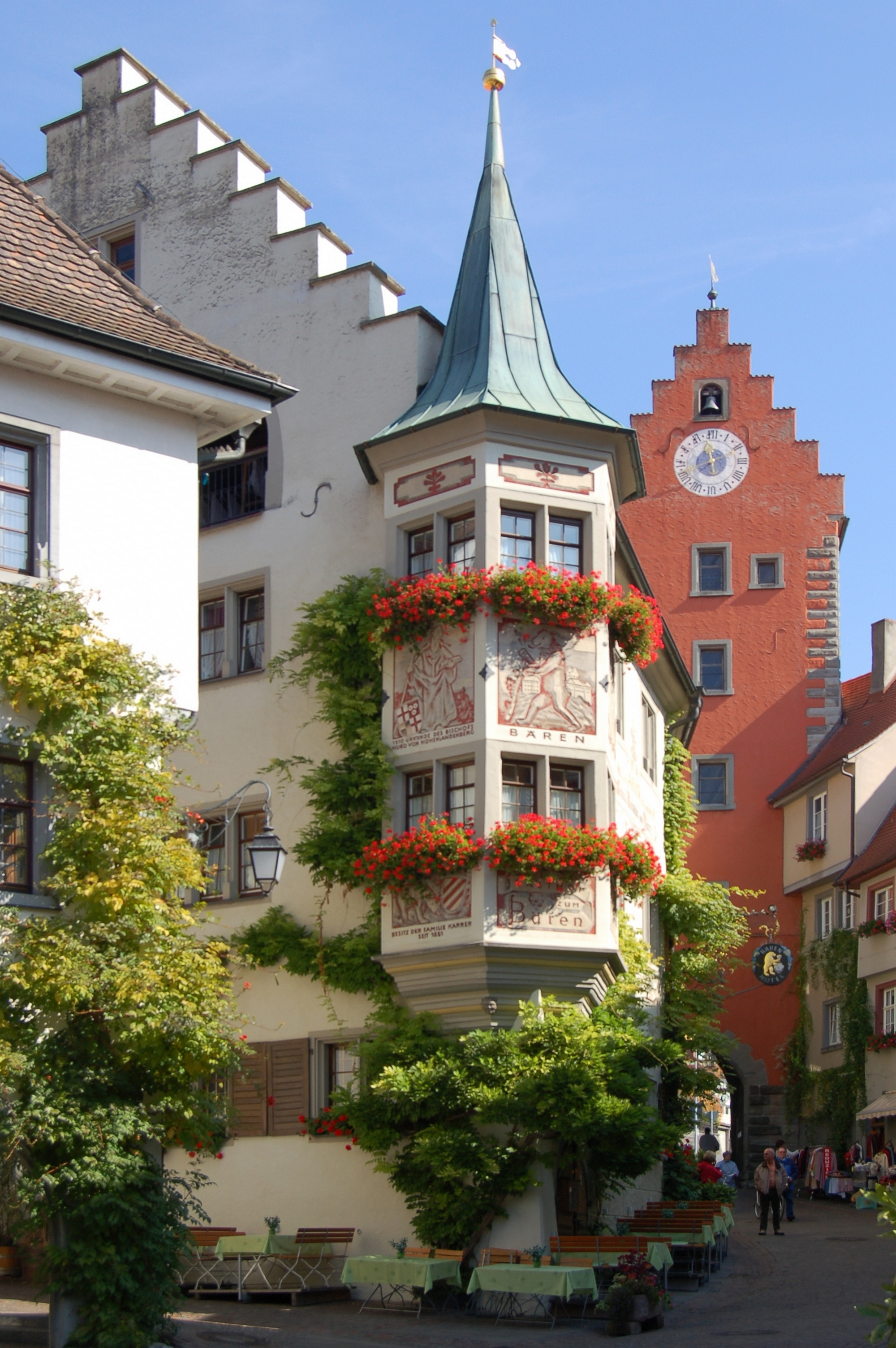 Der Erker des Hotels »Bären« mit dem Obertor im Hintergrund ist wohl das am meisten fotografierte Objekt in Meersburg.